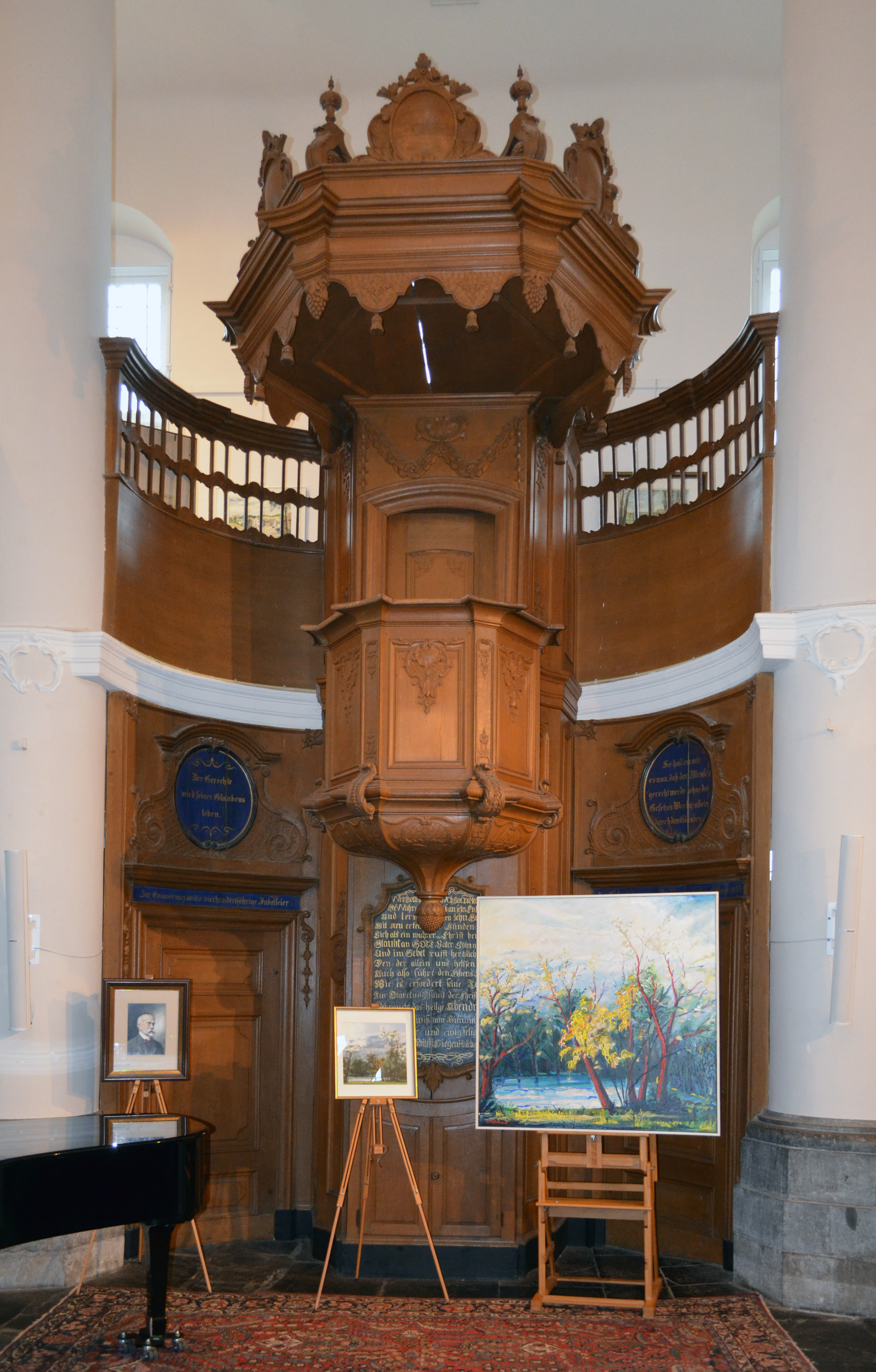 Lutherische Kirche de Kopermolen in Vaals, Kanzel